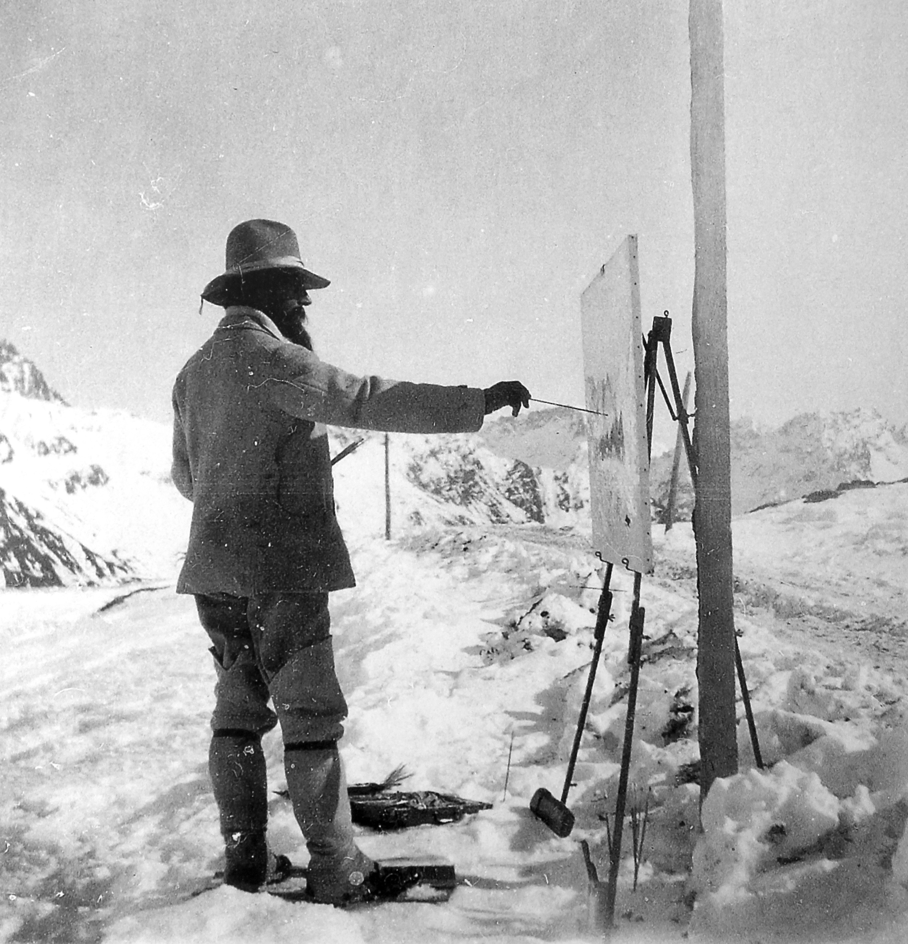 Peter Robert Berry am 13. Februar 1908 auf der Bernina